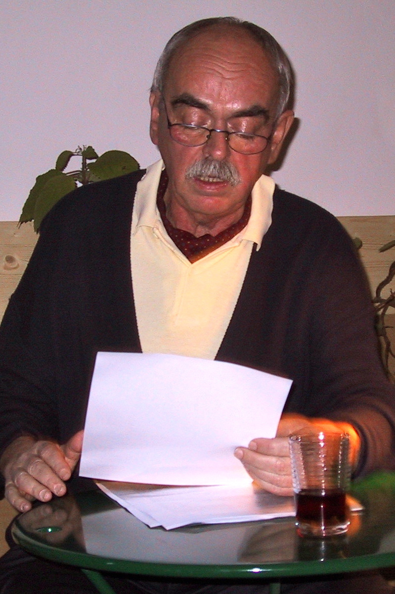 Peter Paul Wiplinger liest im Literarischen Salon, Praterstraße 17, Wien II (2003).